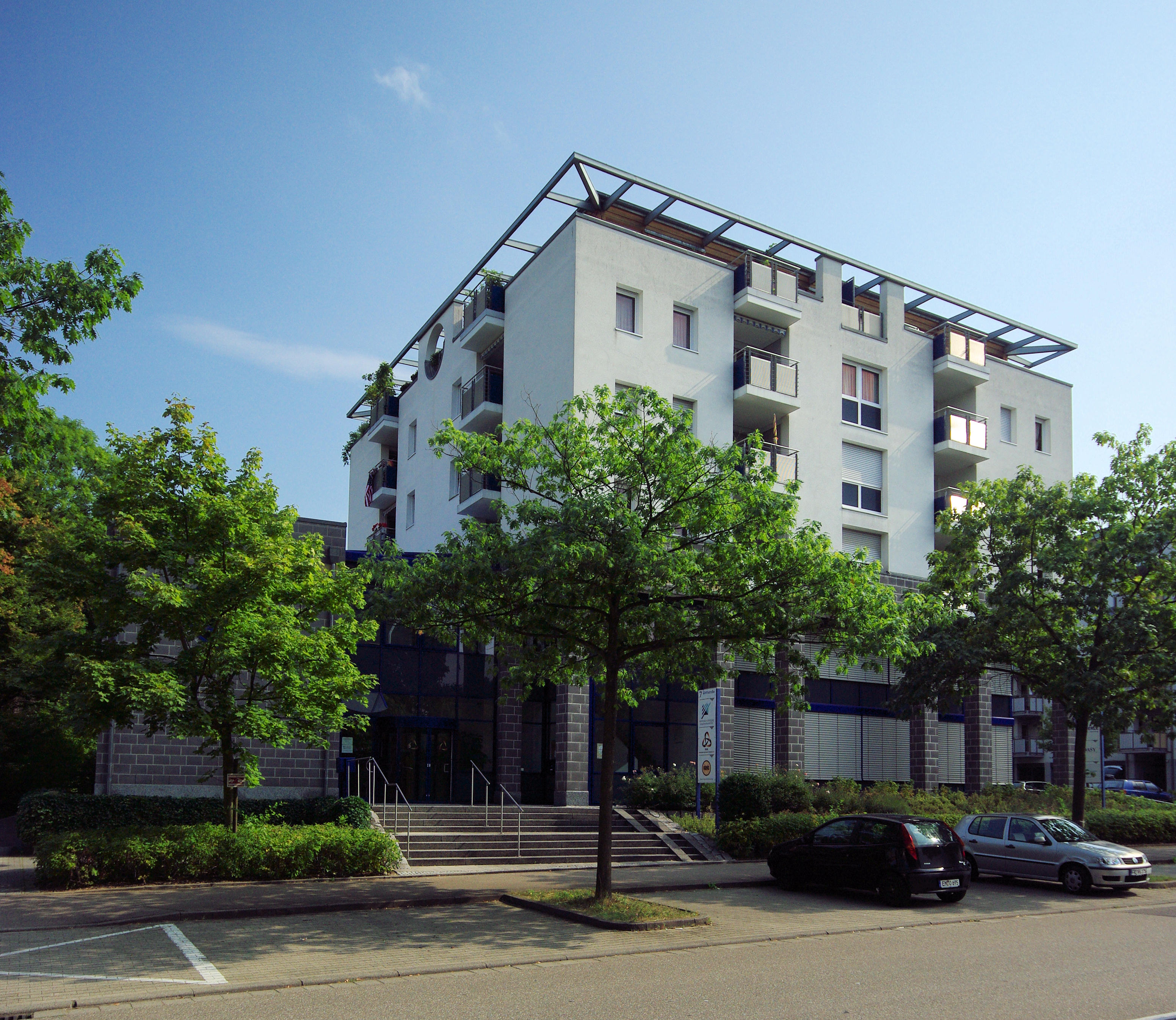 Haus des Badischen Sportbundes